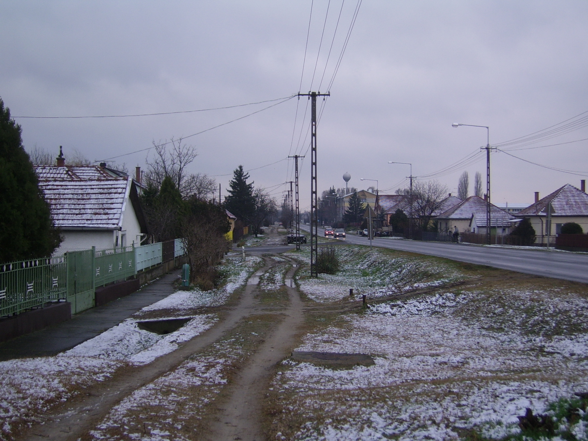 Első hó (Örkény, Bartók Béla utca) 2010. november 27.